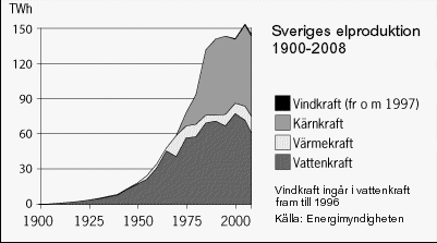 Sveriges Elproduktion mellan 1900 och 2008. Källa Energimyndigheten